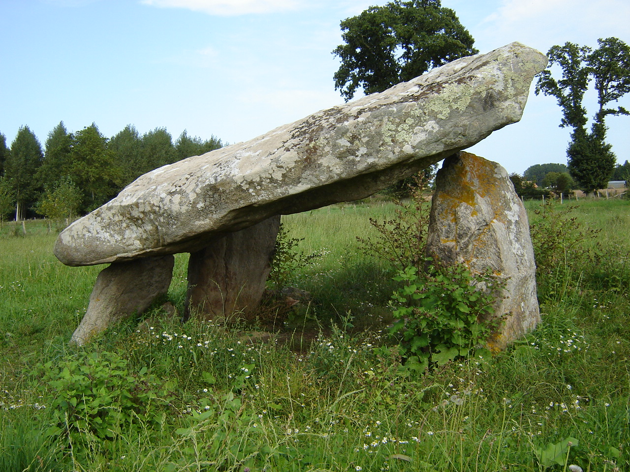 Le Dolmen de la Roche aux Loups ou « Pierre aux Loups » est situé au village de Bergon. Ce dolmen possède une énorme table penchée longue de quatre mètres.